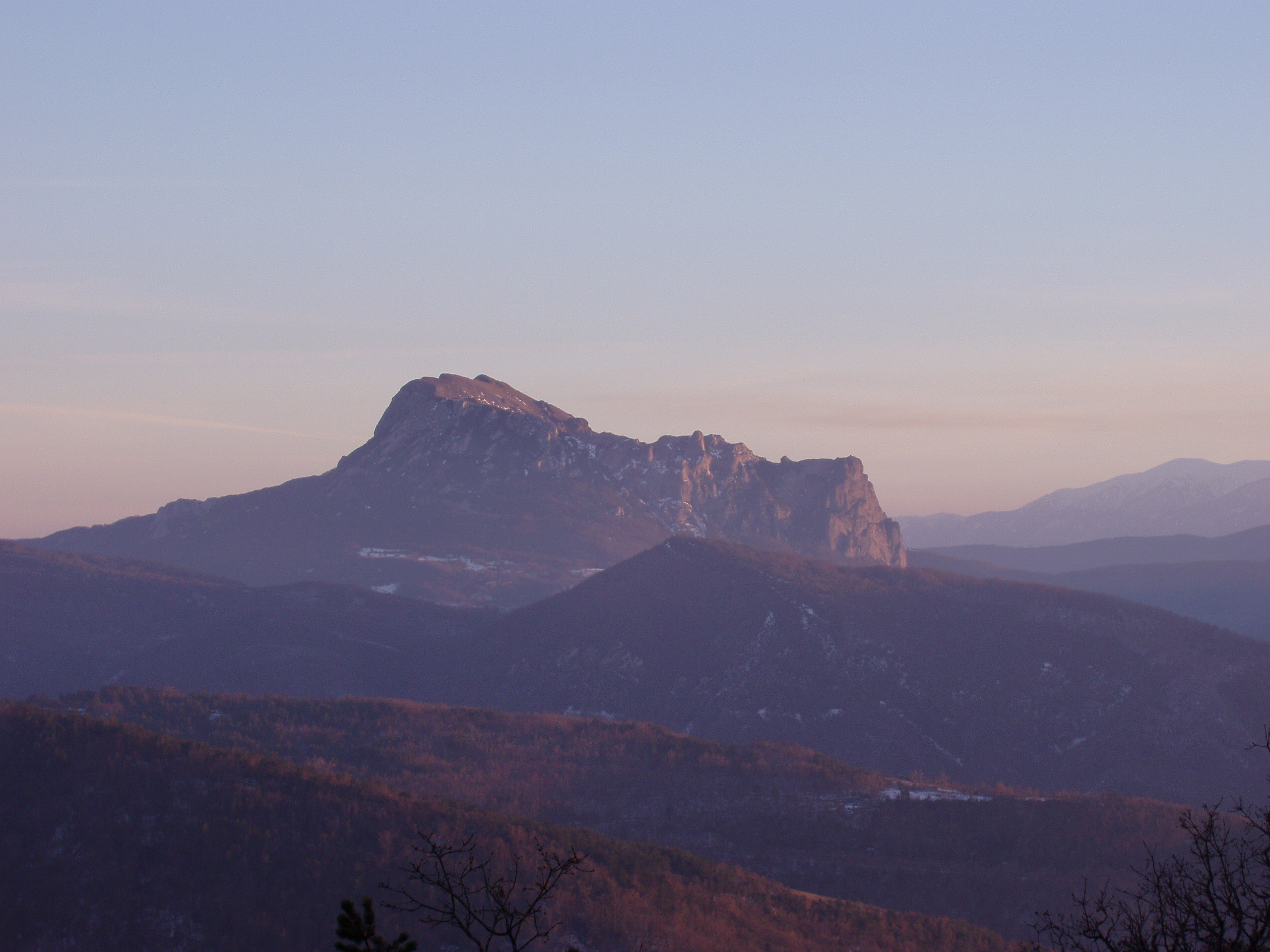 Photo du Pic de Bugarach